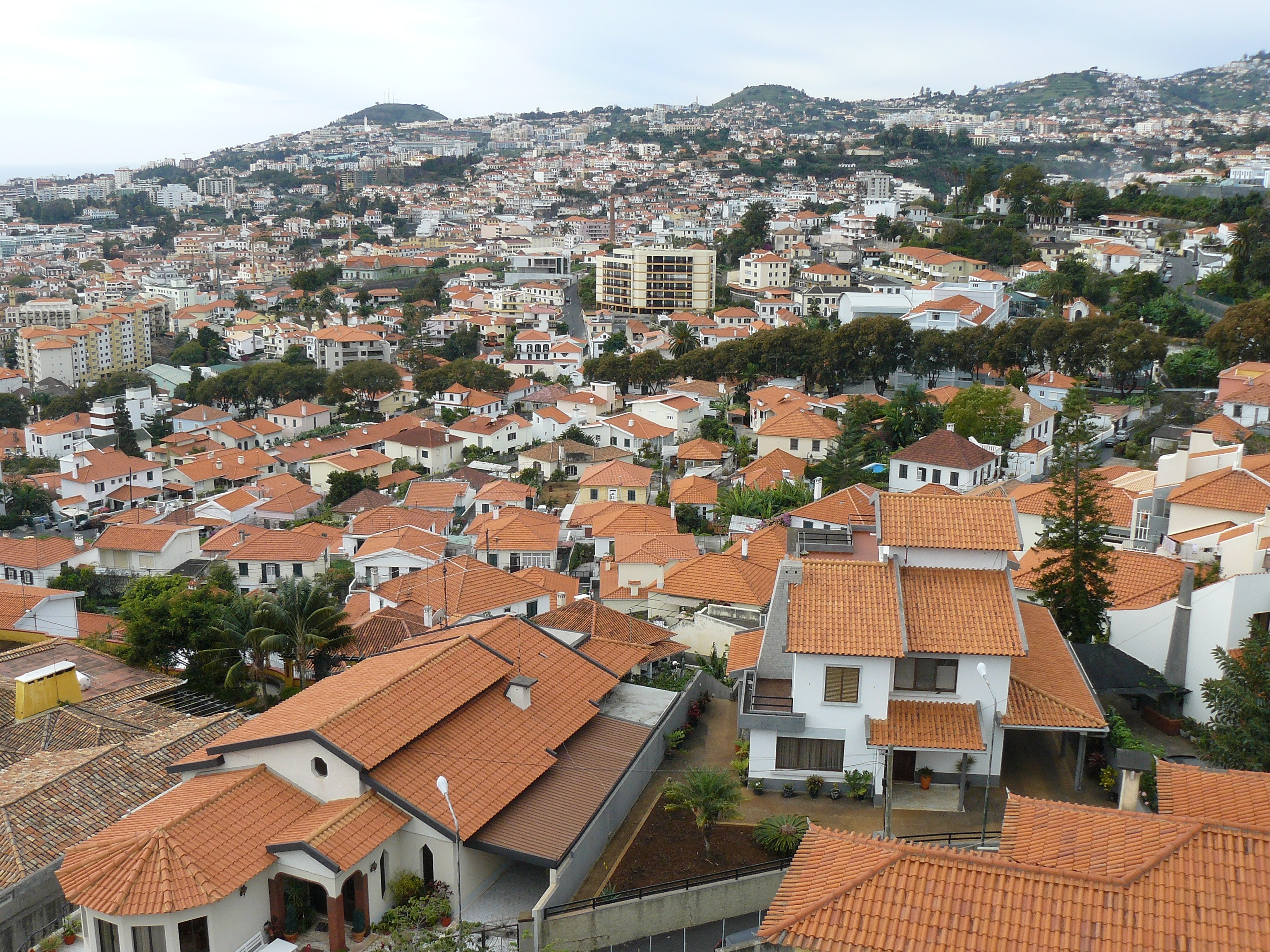 Funchal, vue du funiculaire